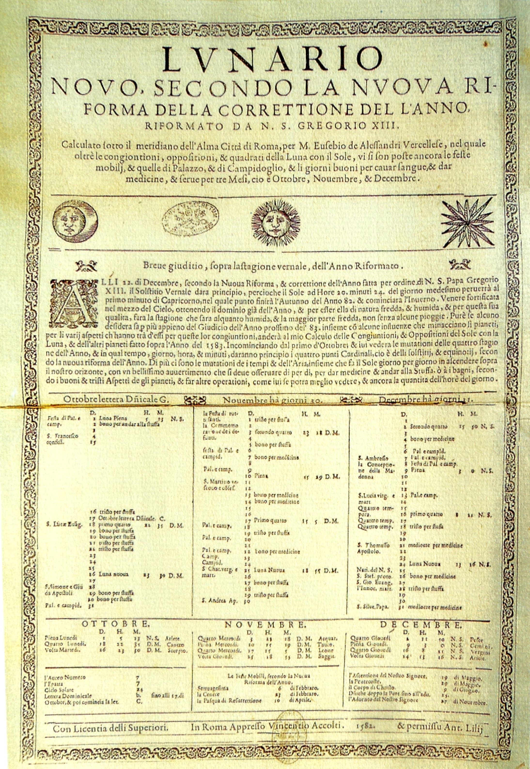 El LUNARIO. El "Lunario" del Vaticano y la información acerca de la reforma del Calendario Juliano por orden del Papa Gregorio XIII. Del "Lunario" de Octubre, Noviembre y Diciembre del año 1582. Notar como "salta" del 4 de Octubre al 15 de Octubre, y esto para "acomodar" nuevamente el 21 de Marzo con el Equinoccio correspondiente. Presentado a las autoridades vaticanas por Antonio Lilio, hermano de Luigi Lilio (el que hizo los cálculos) e Impreso por Vincentio Accolti. Ver transcripción del texto de la bula papal Ver cálculo del año bisiesto y reforma gragoriana Ver Correspondencia del Calendario Gregoriano con el Juliano.